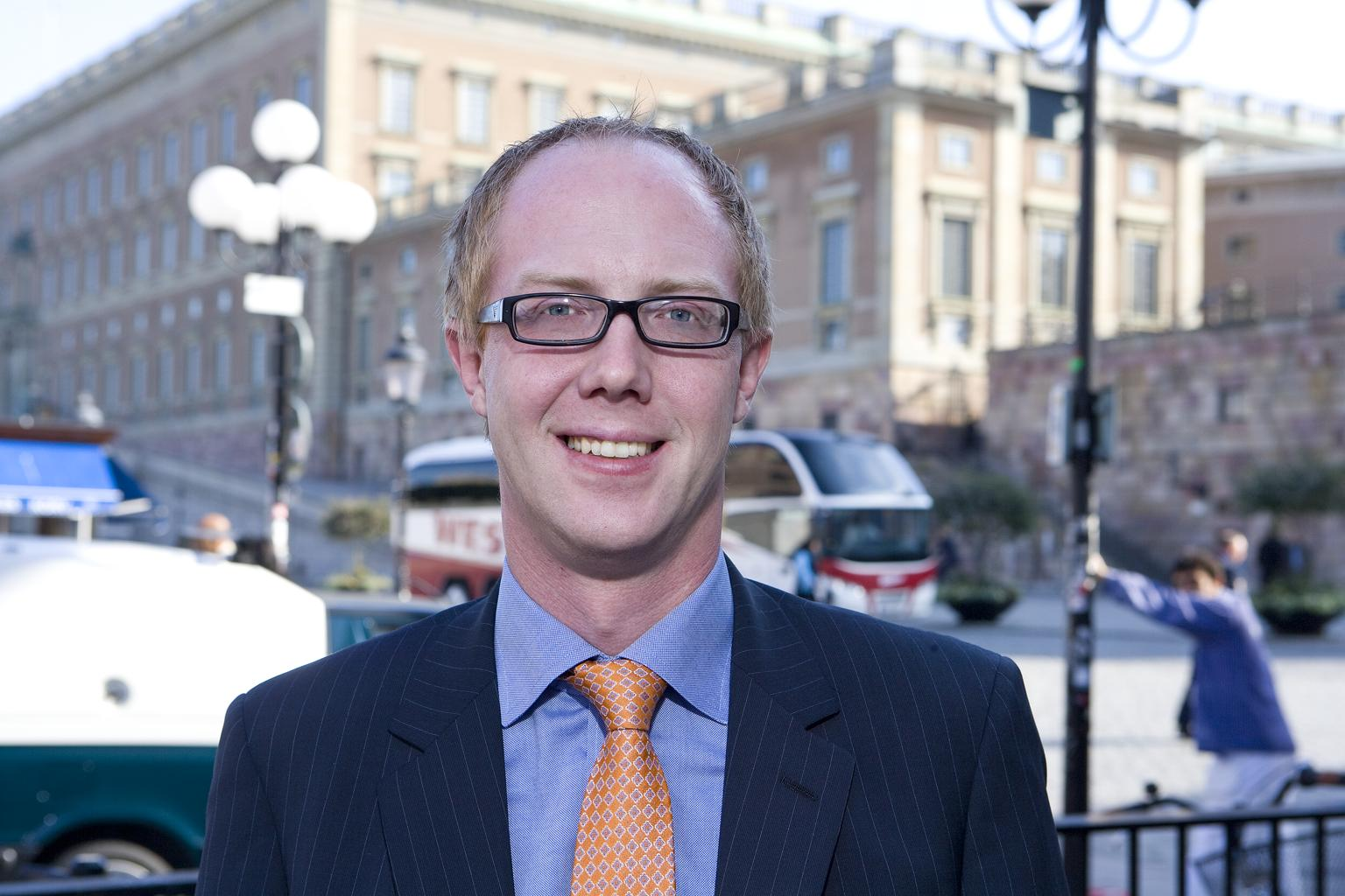 vasterteg_claes_02